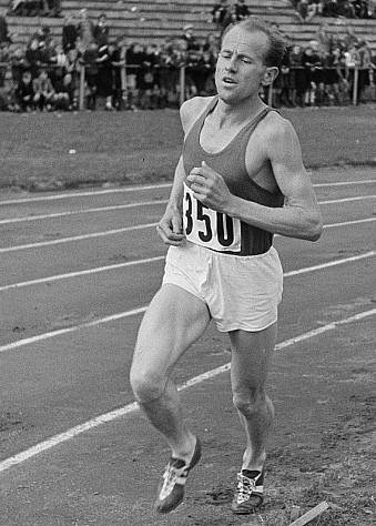 Original image description from the Deutsche FotothekEmil Zátopek bei einem Wettkampf